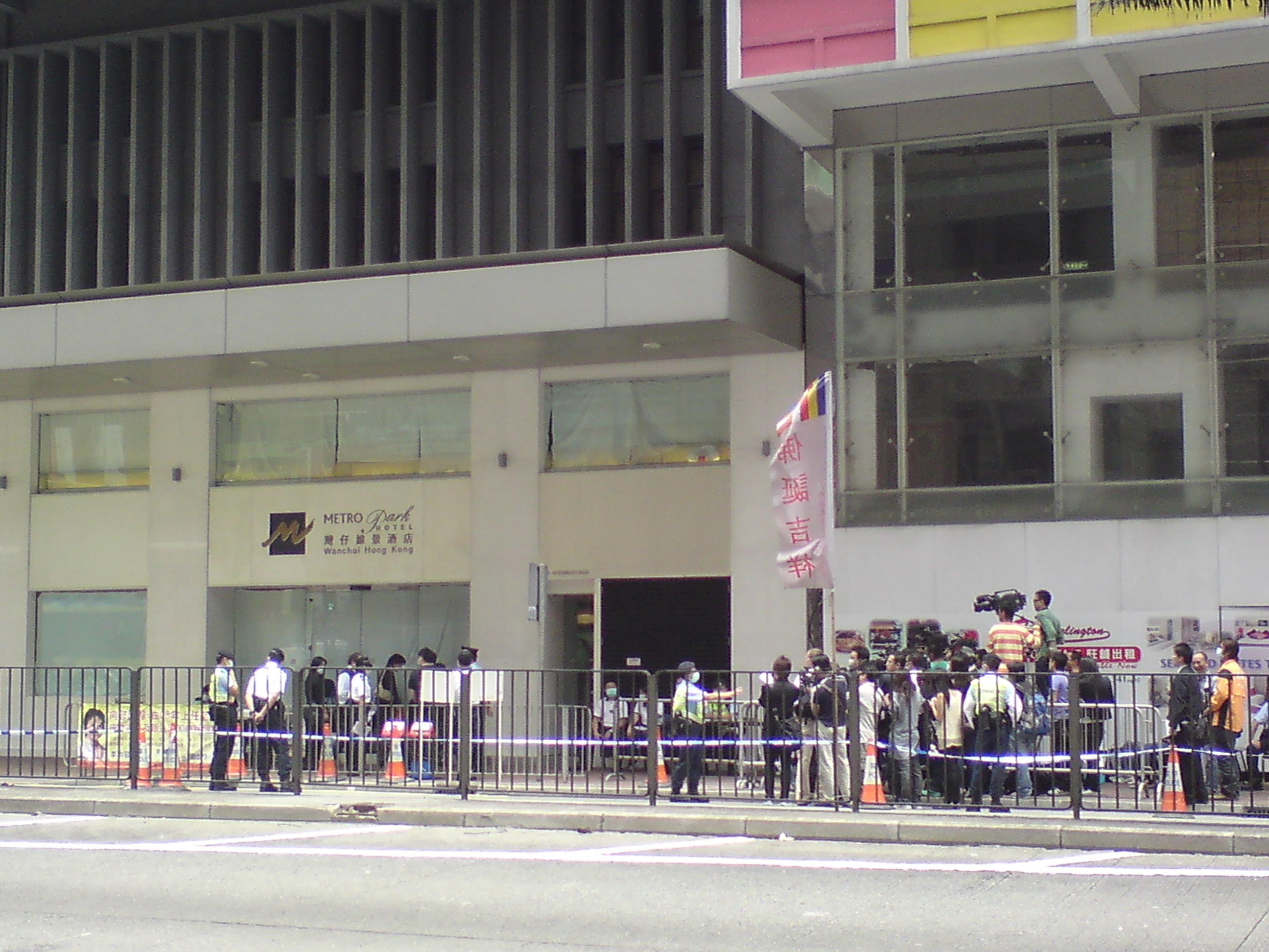 Metropark Hotel Wanchai under swine flu quarantine, Hong Kong